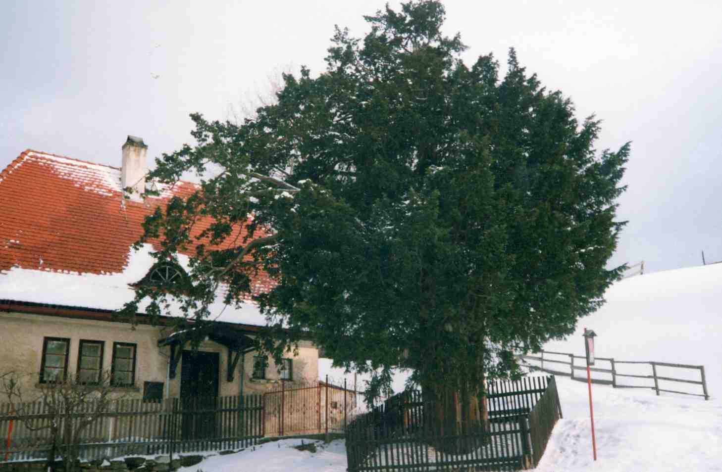 Krombacher Eibe